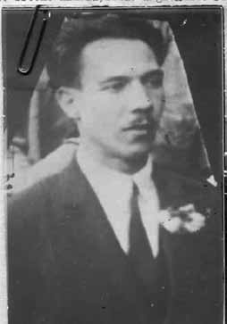 Srpskohrvatski / српскохрватски: Slika komunističkog revolucionara Adolfa Muka, pre 1936.